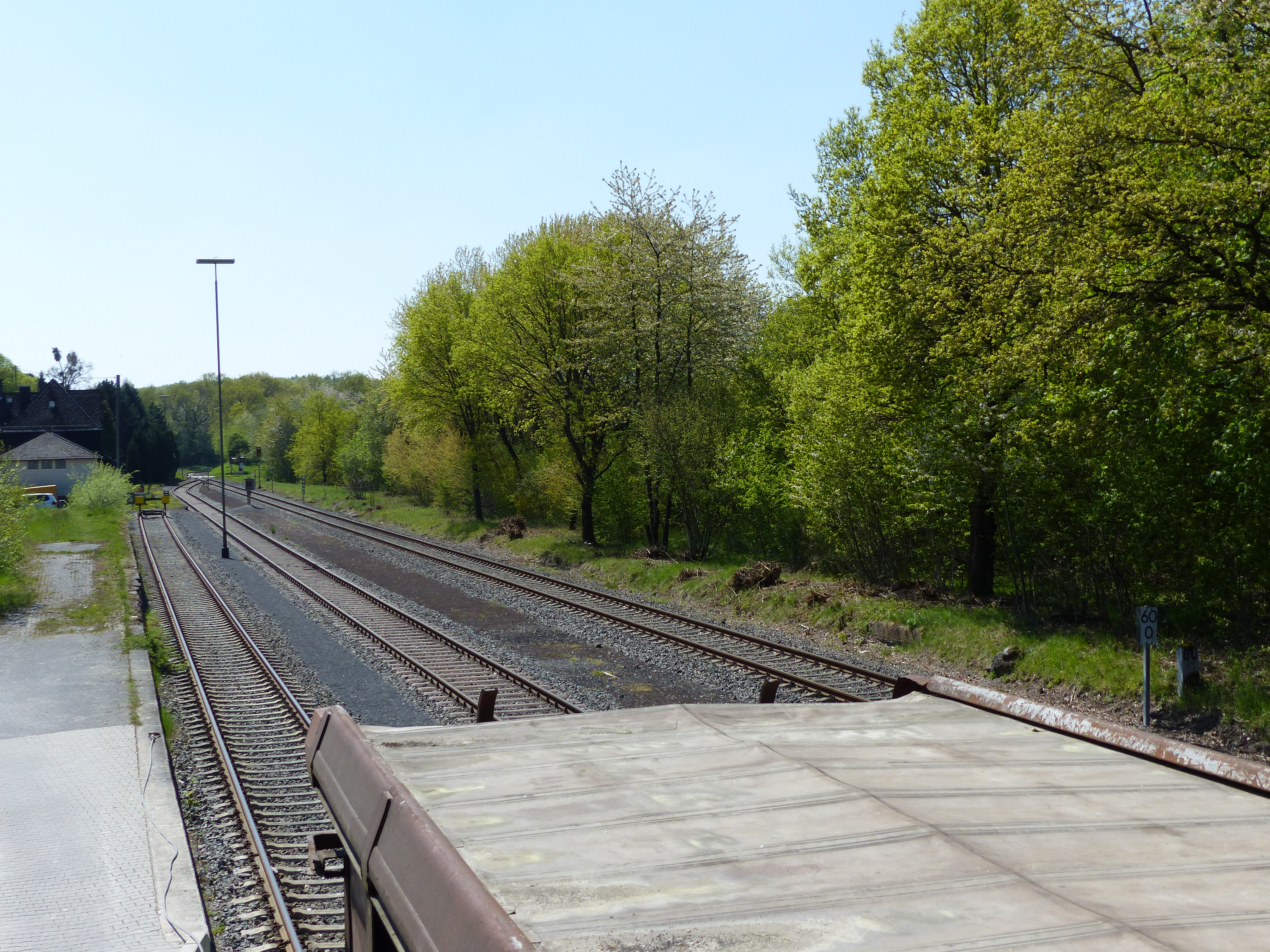 Bahnhof Wallmerod (Blick von der Rampe zur Verladung von Ton)